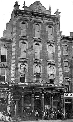 Briggs Hardware Building